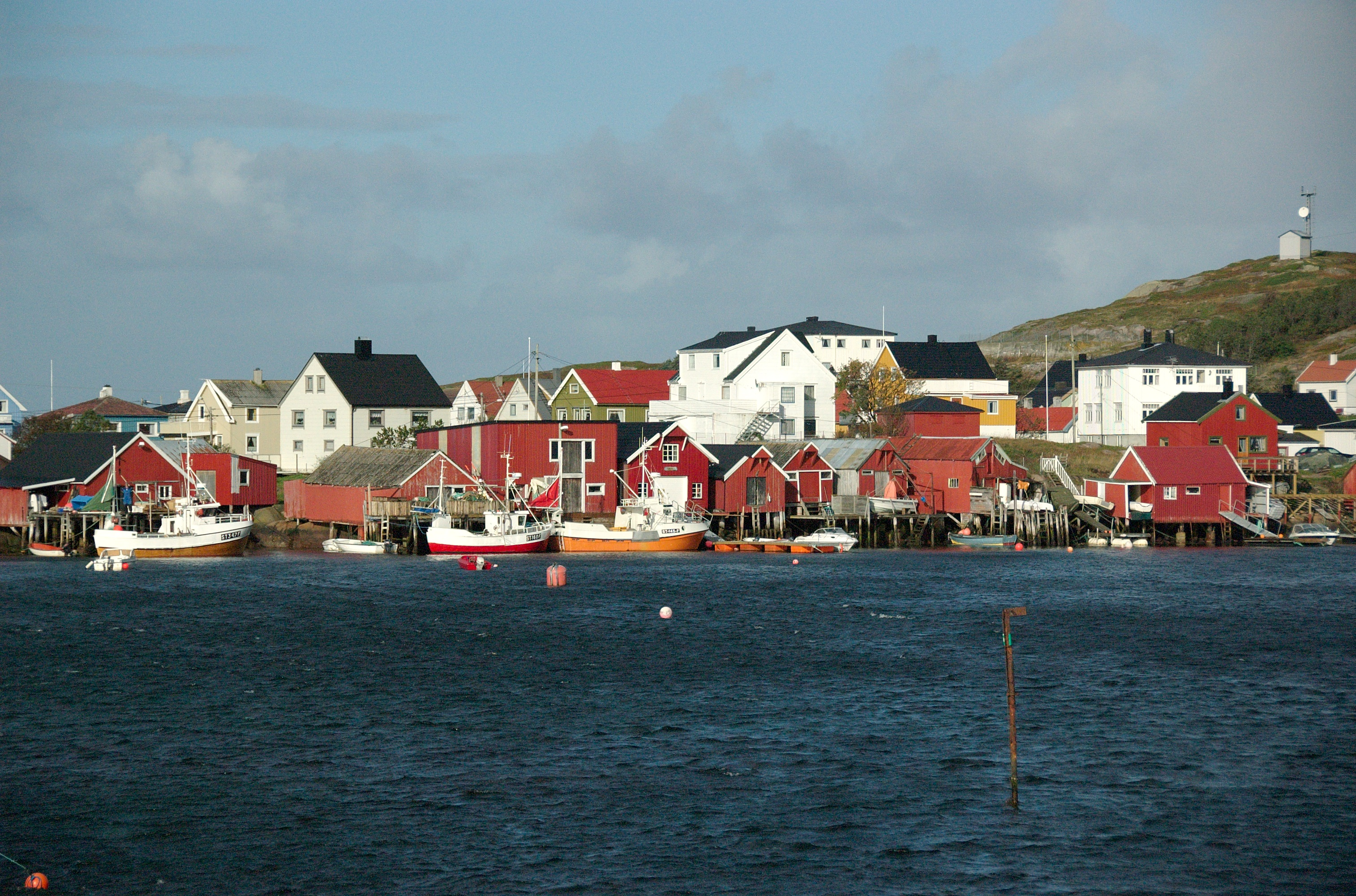 Sula in Frøya